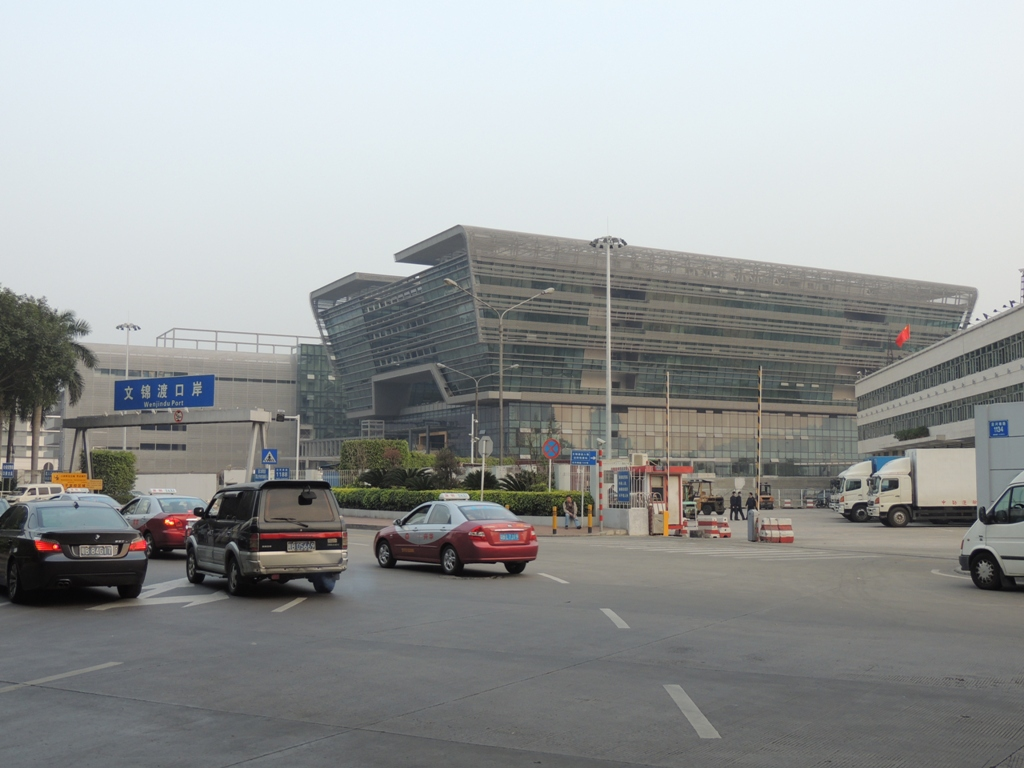 Shenzhen Wenjindu Port